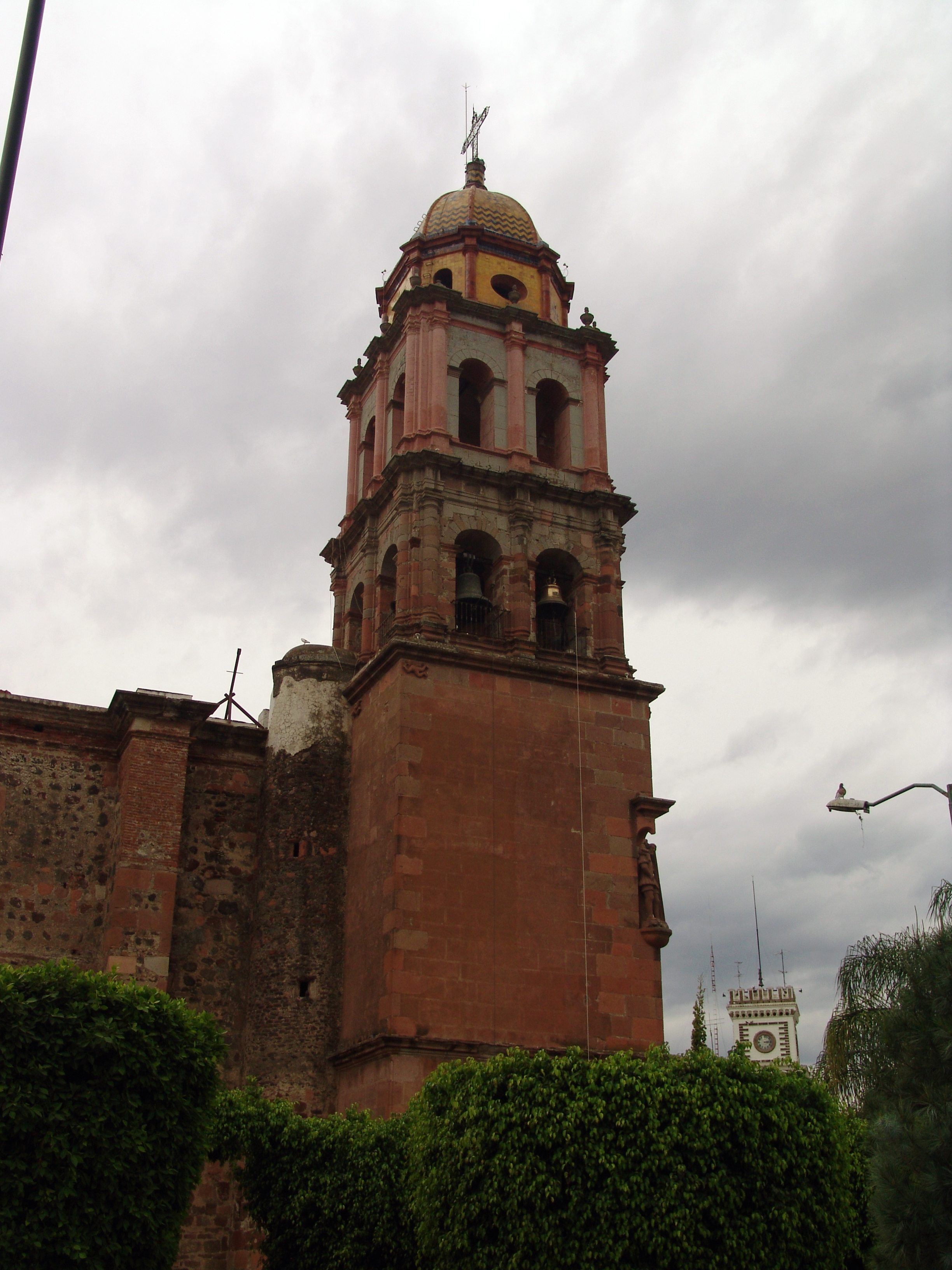 Iglesia de Ameca